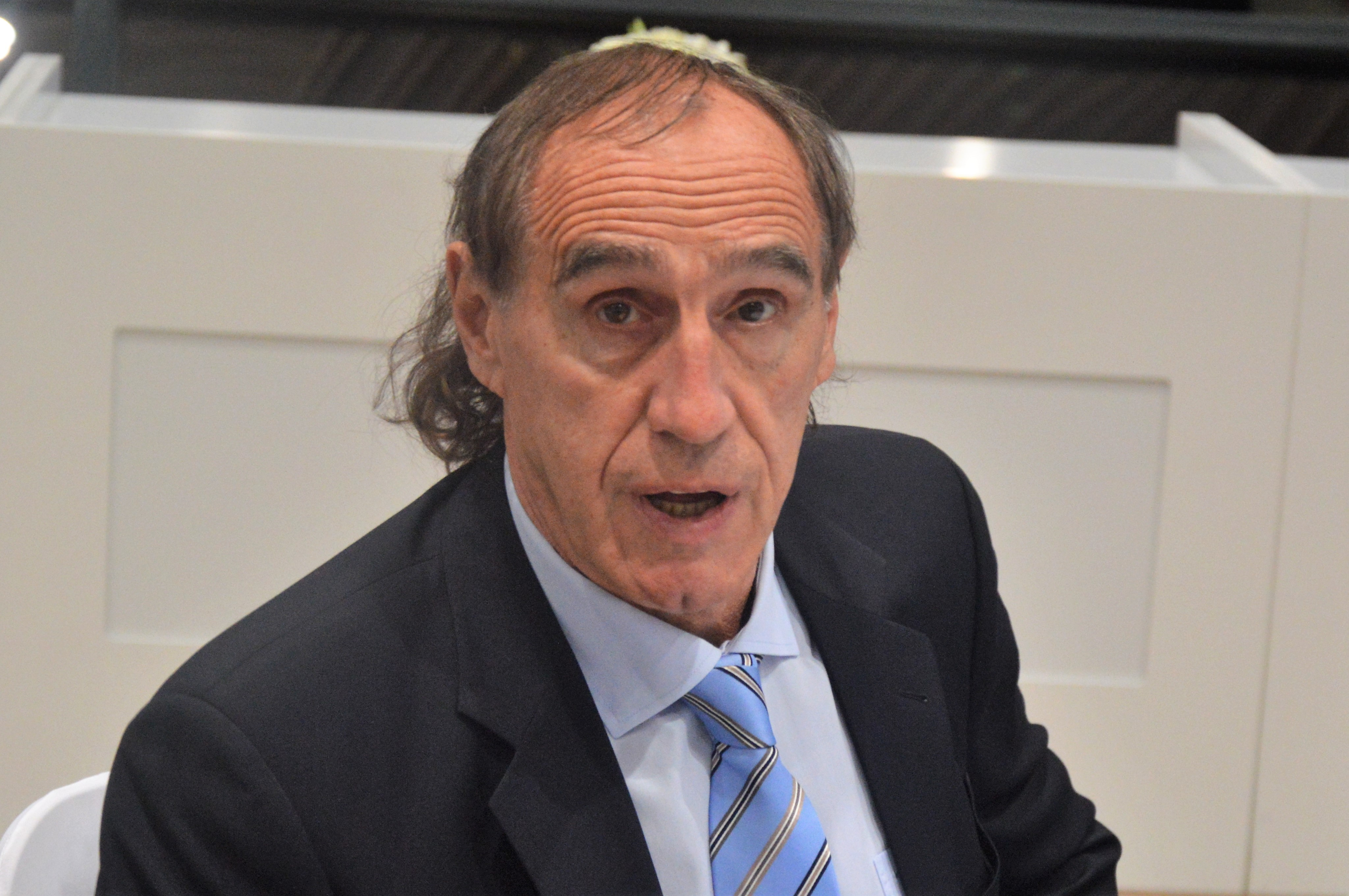 Faragó Tamás olimpiai bajnok vízilabdázó